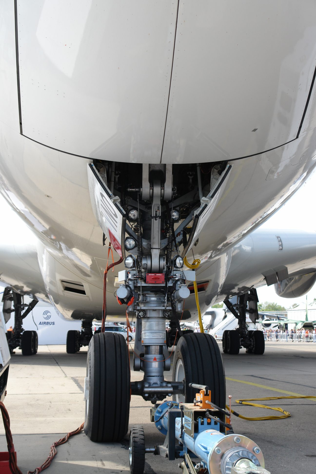 Bugfahrwerk eines Airbus A380 auf der ILA 2008